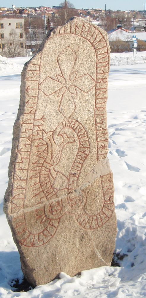 Frösöstenen runsten på Frösön